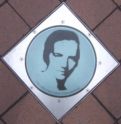 Marie Kahle – Glasplatte in der Bonngasse Bonn